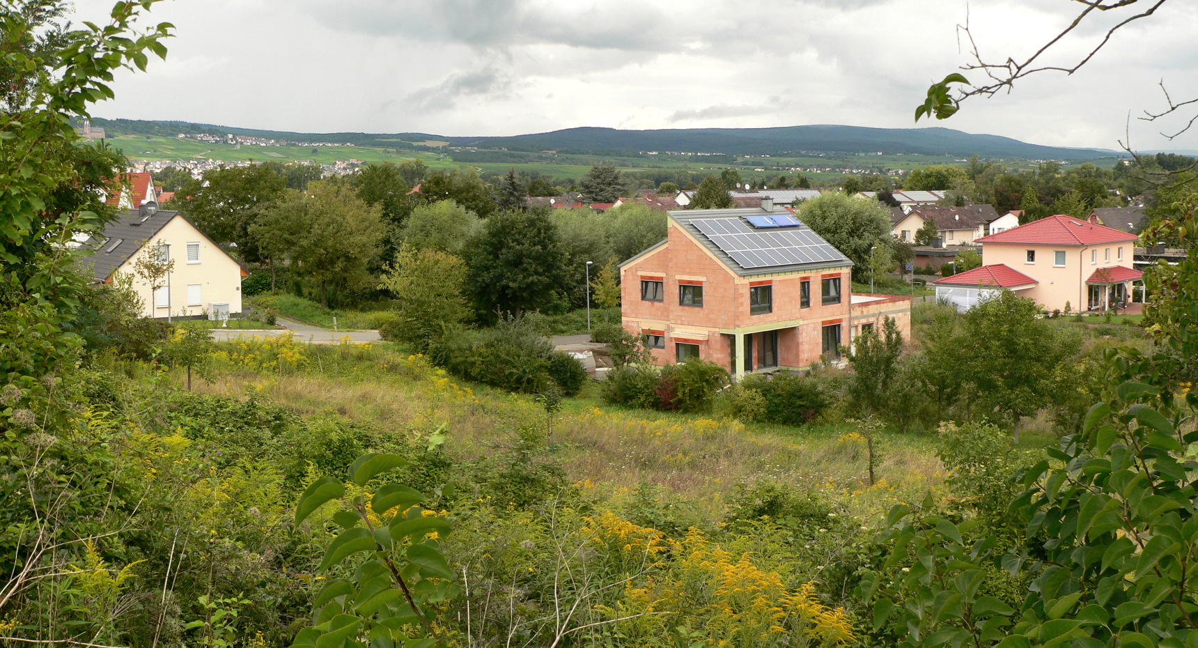 Blick vom Brachgelände mit den Bodenresten der Villa Rustica Kempten hinunter zum Rhein und auf den Rheingau